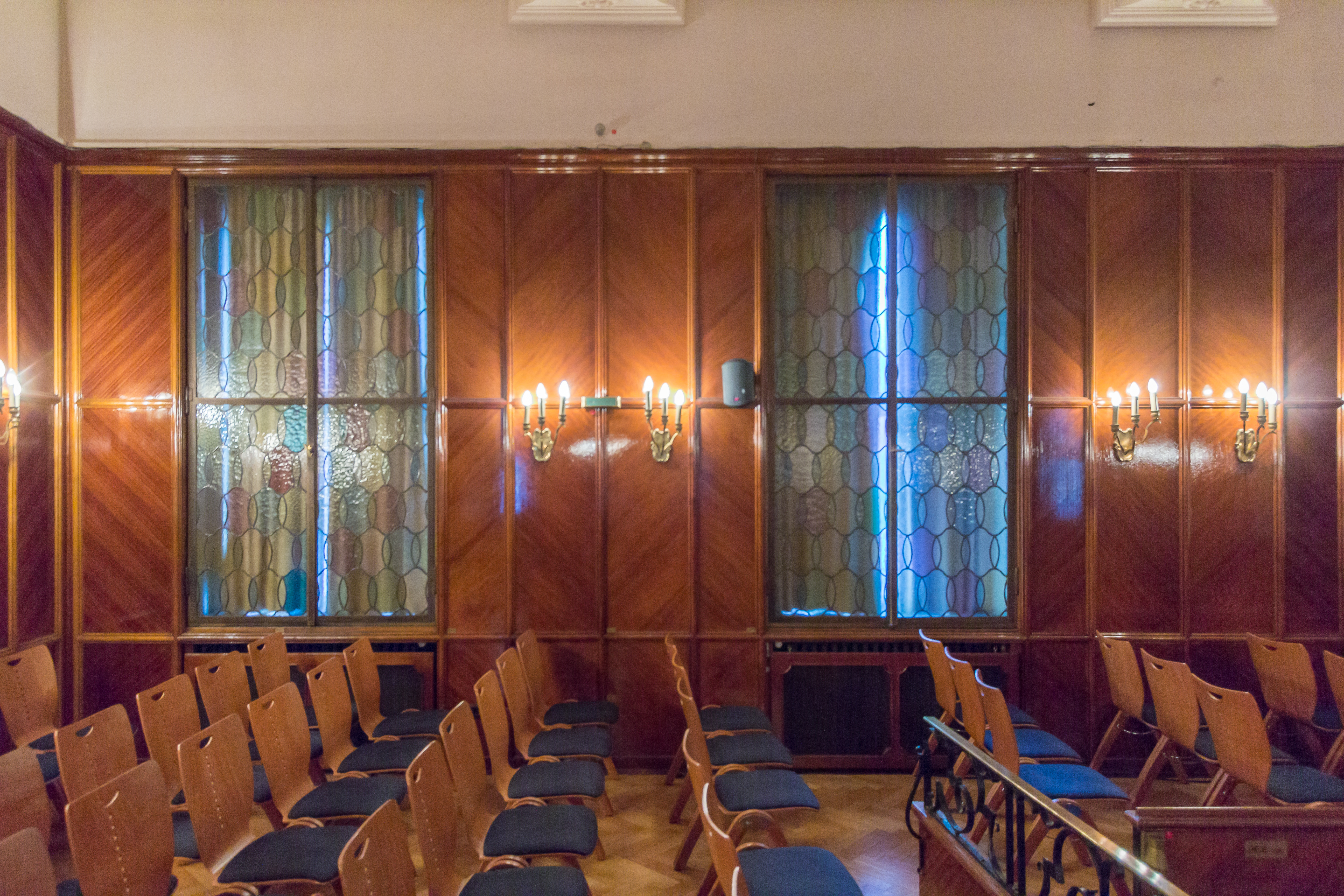 Belgisches Haus Köln - holzvertäfelte Wand mit Lampen und Buntglasfenster im Saal This is a photograph of an architectural monument.